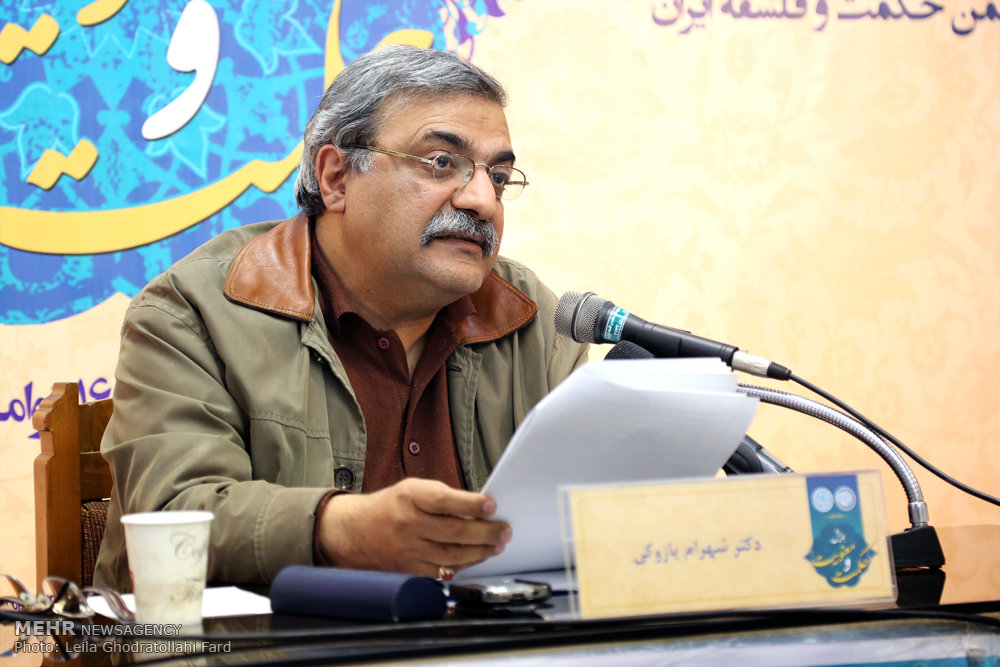 شهرام پازوکی در روز جهانی فلسفه با موضوع همایش حکمت و معنویت در موسسه حکمت و فلسفه سخنرانی کرد